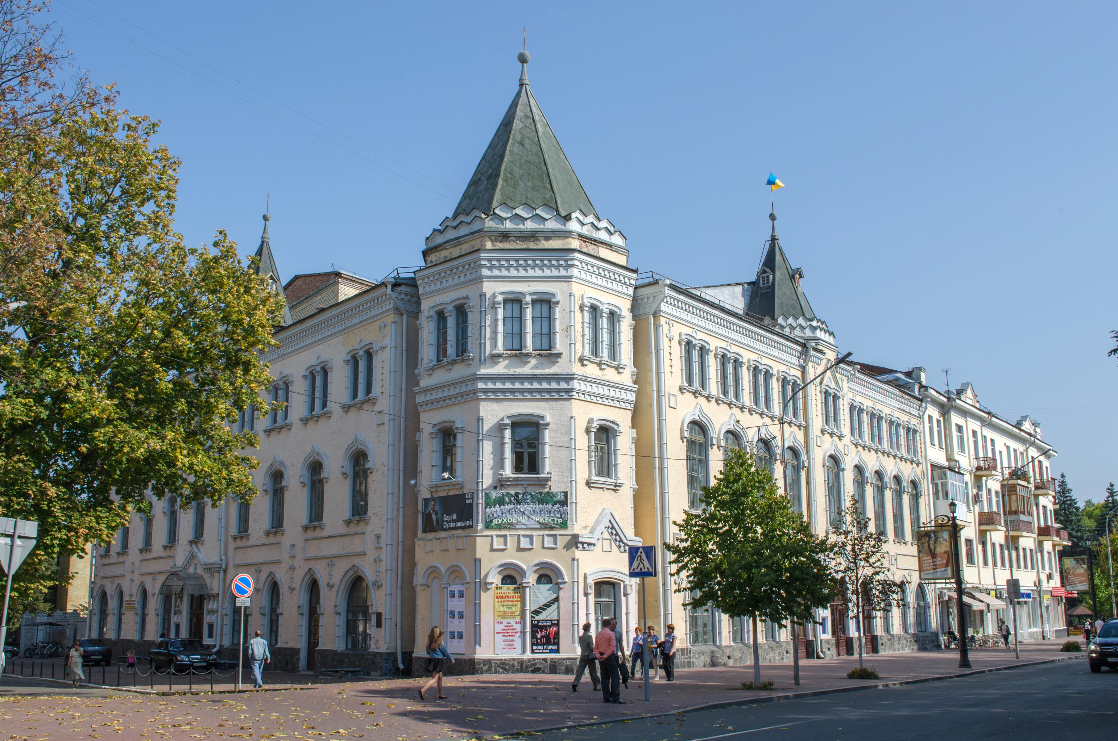 Єпархіальне братство — будинок, в якому проходила 1-ша облпартконференція, на якій виступив голова ВУЦВК Г.І. Петровський – радянський державний і партійний діяч, Чернігів, пр-т. Миру, 15